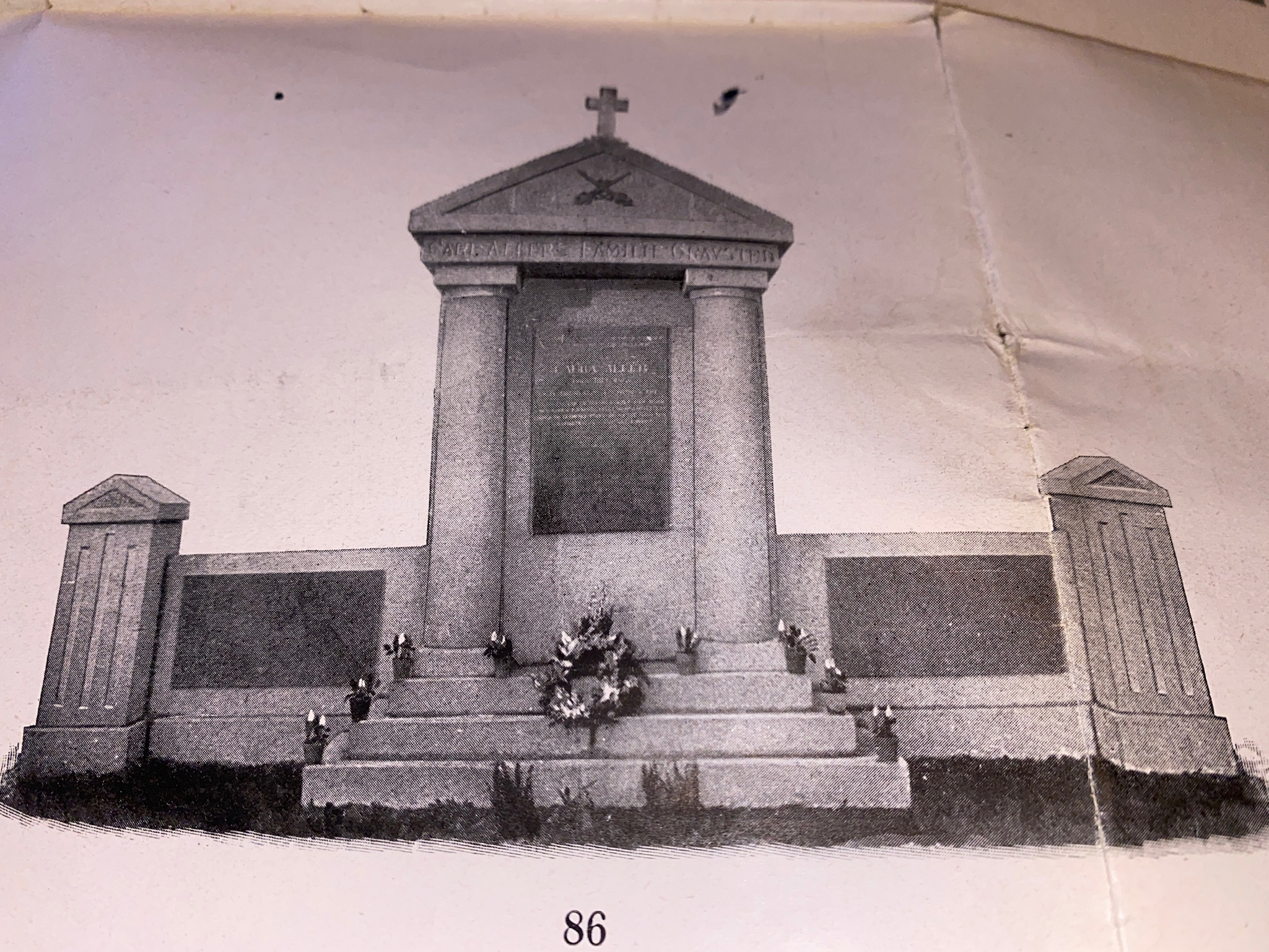 Vestre kirkegård